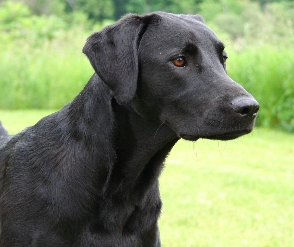 A black Labrador Retriever.